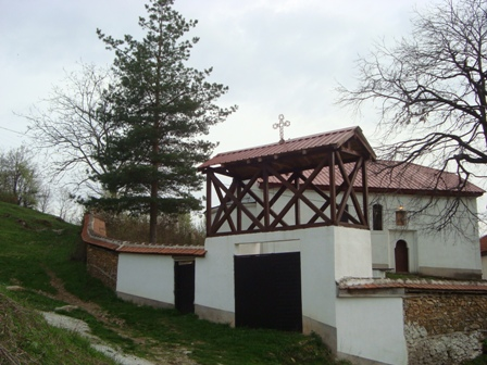 Църквата „Свети Георги“ в Куново, Гостиварско, Република Македония.